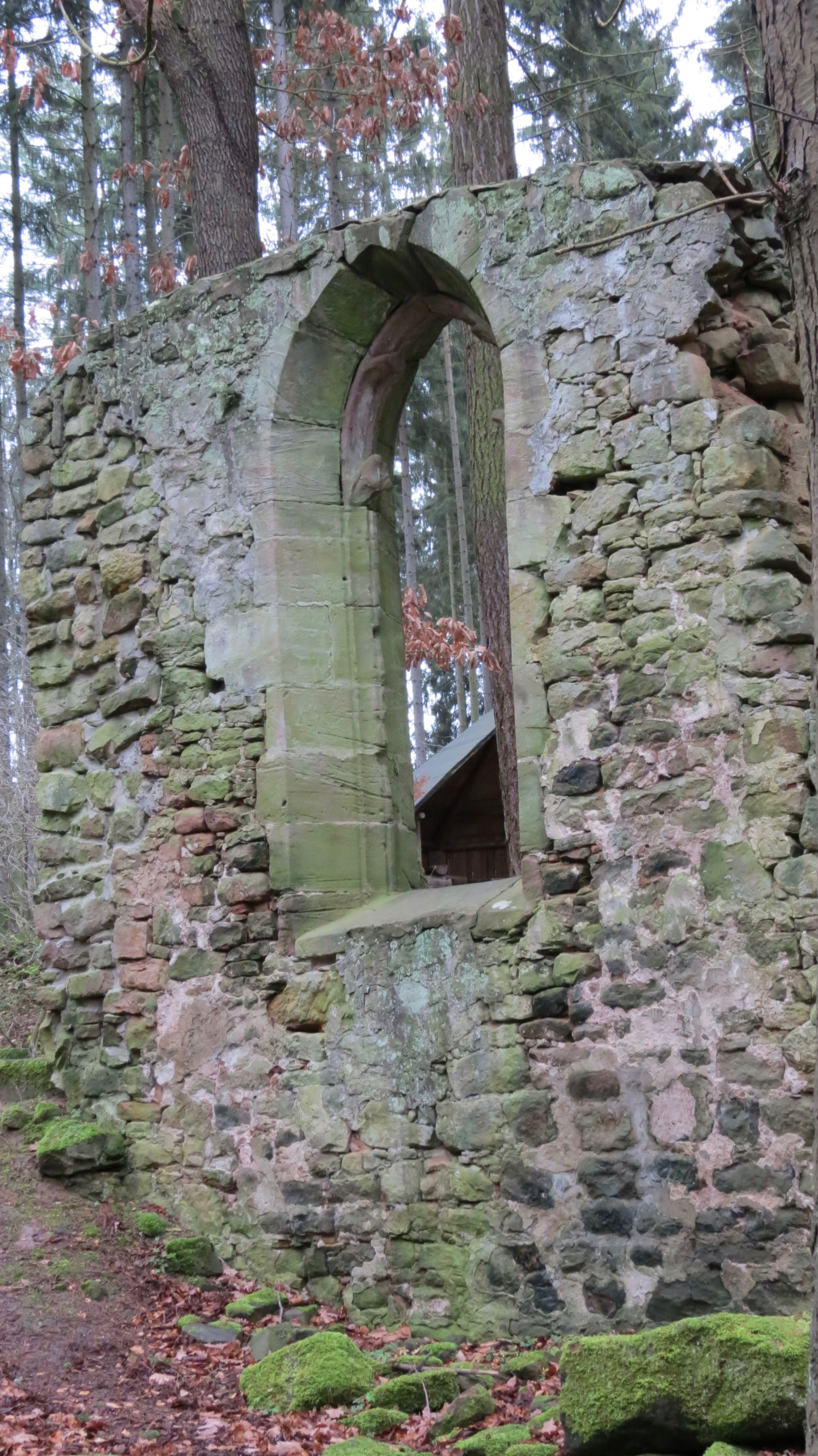 Im Winter